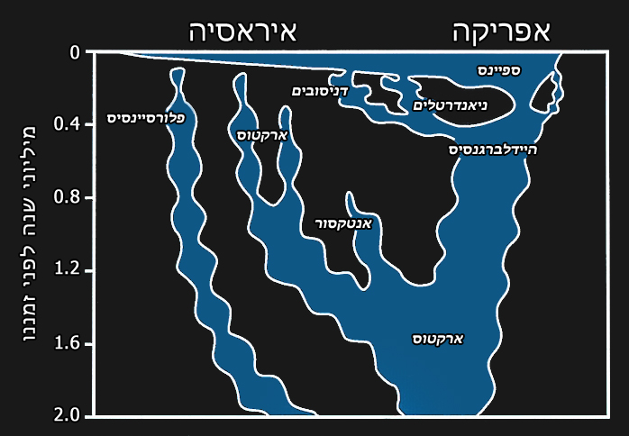 התאוריה המעודכנת של כריס סטרינגר לאבולוציה של סוג האדם לאור התגליות האחרונות מן הגנום הניאנדרטלי והגנום הדניסובי.